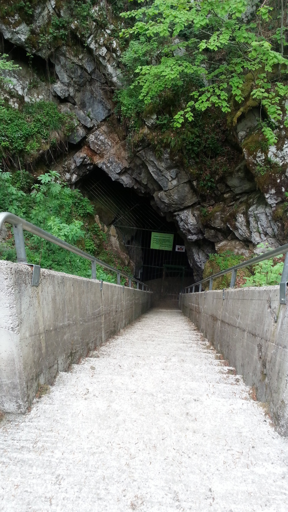 Stopnice do vhoda v Županovo jamo (Taborsko jamo)